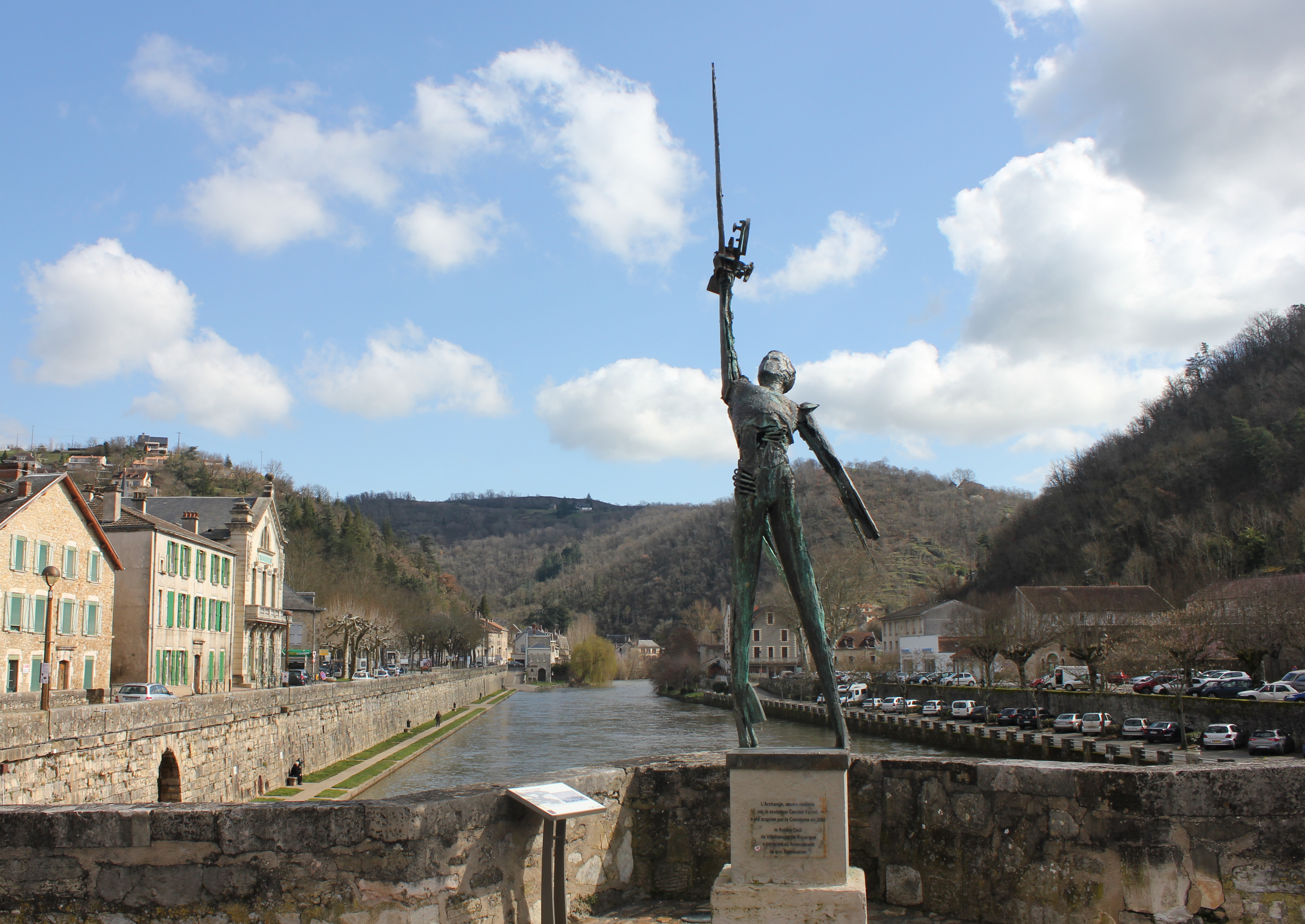 Pont des Consuls à Villefranche-de-Rouergue